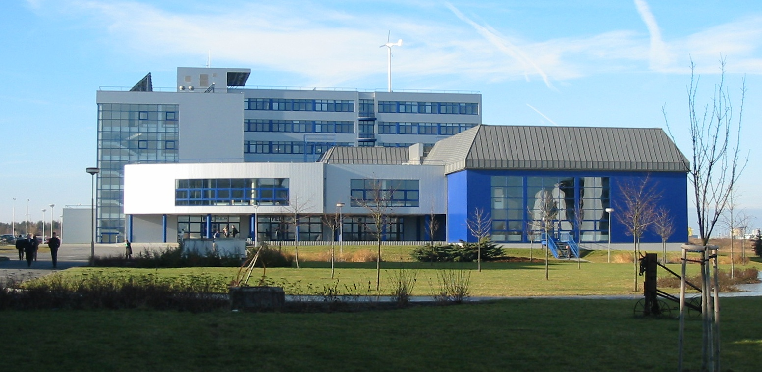 Elektrotechnická fakulta Západočeské univerzity – nová budova na borských polích. Autor fotografie: Wikipedista:Parkis Datum vytvoření: 10.1.2005